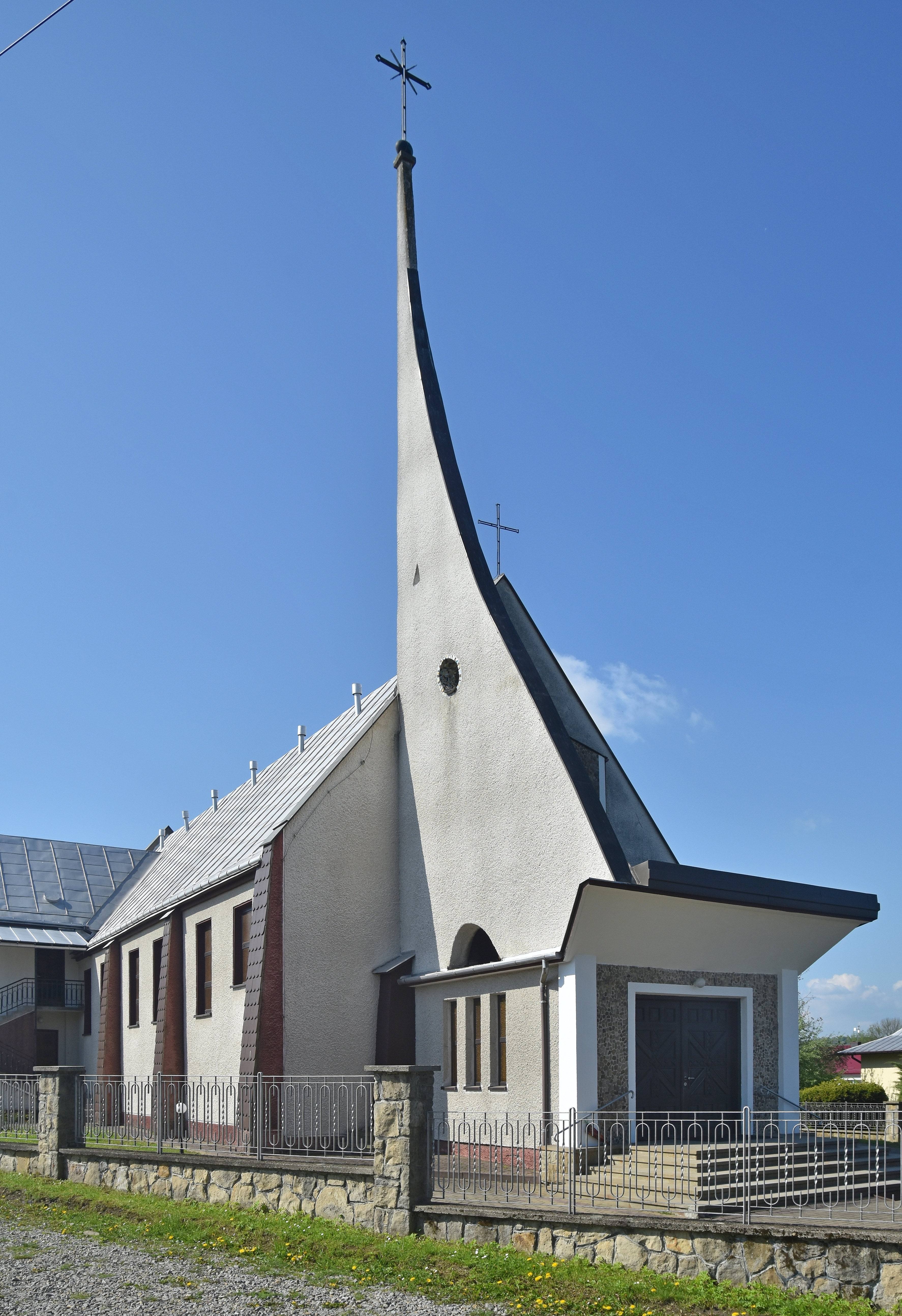 wieś Czeluśnica